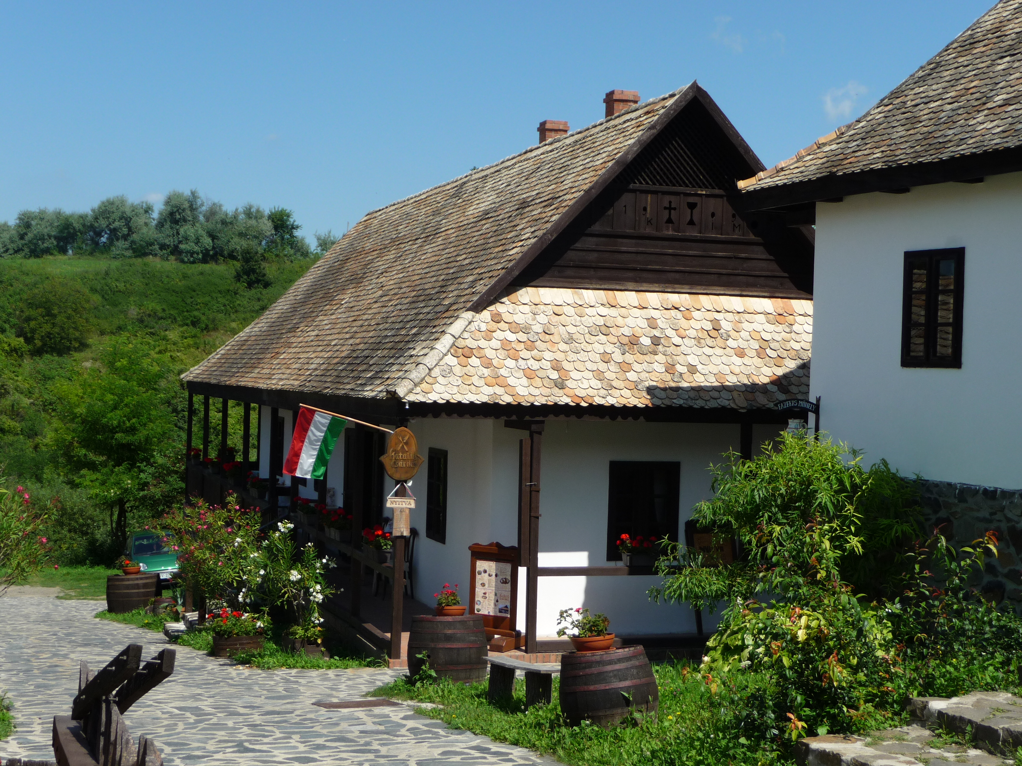 Hollókő, Kossuth L. út 67.